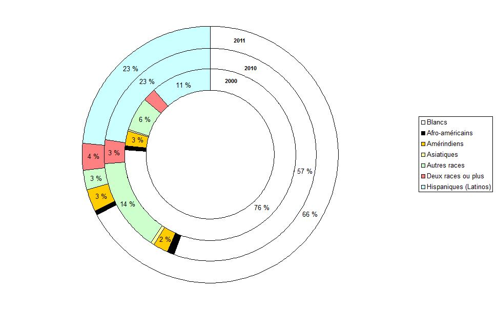 Composition raciale de la population de Hartford (Michigan, Etats-Unis).